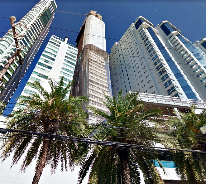 Epic Tower em fase final de construção em julho de 2017